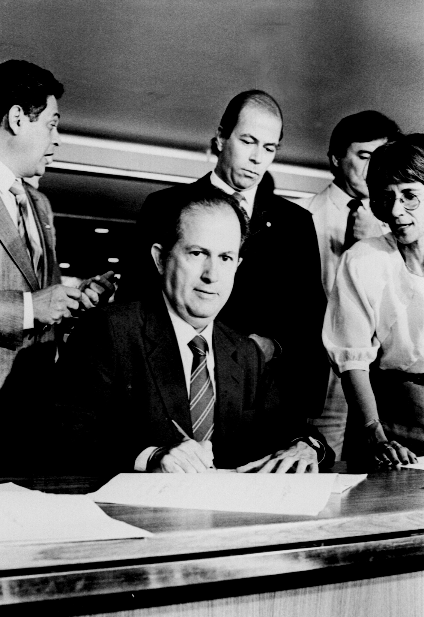 Assinatura da Constituição em 29/09/1988. Participantes - Senador Albano Franco. Foto: Célio Azevedo